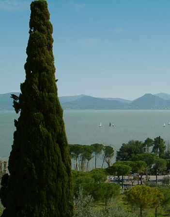 Lake Trasimeno